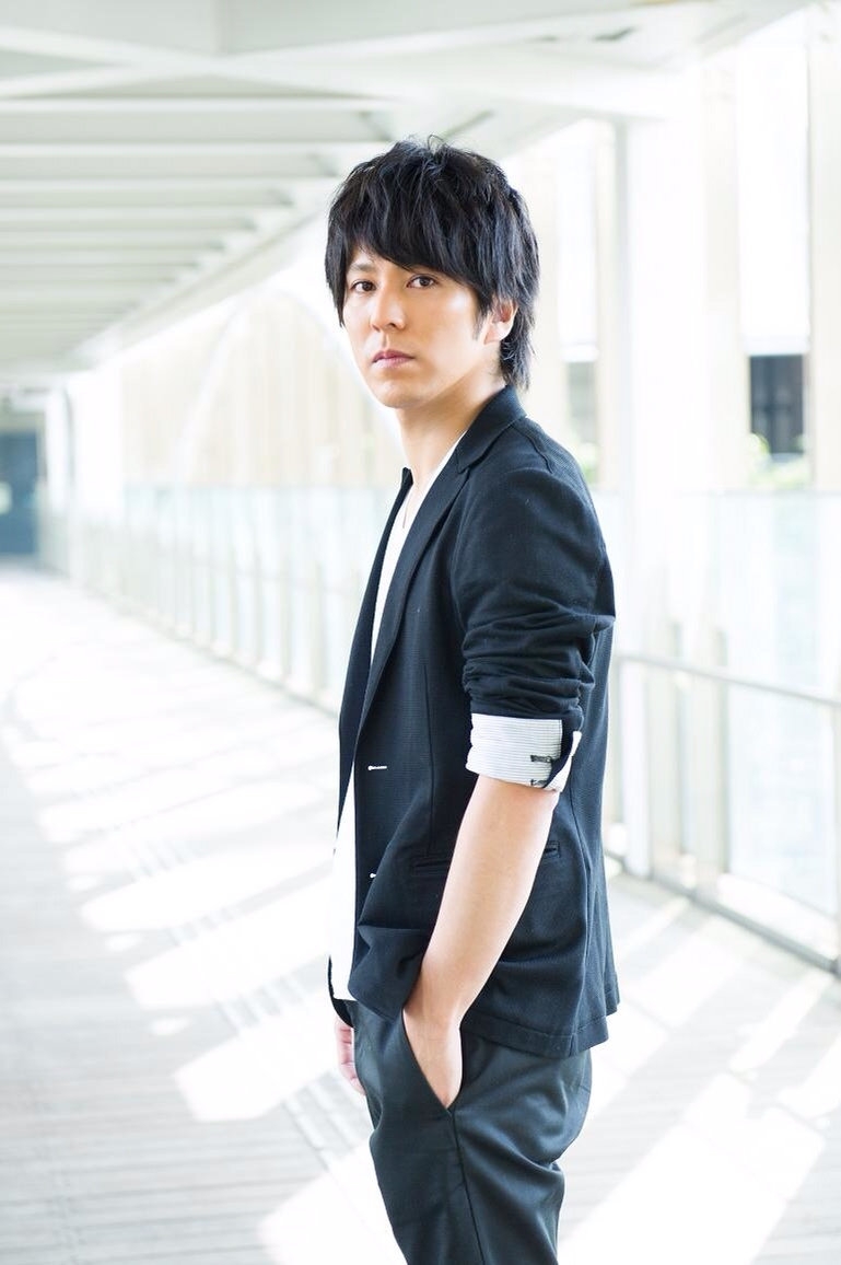 図師 光博 zushi mitsuhiro